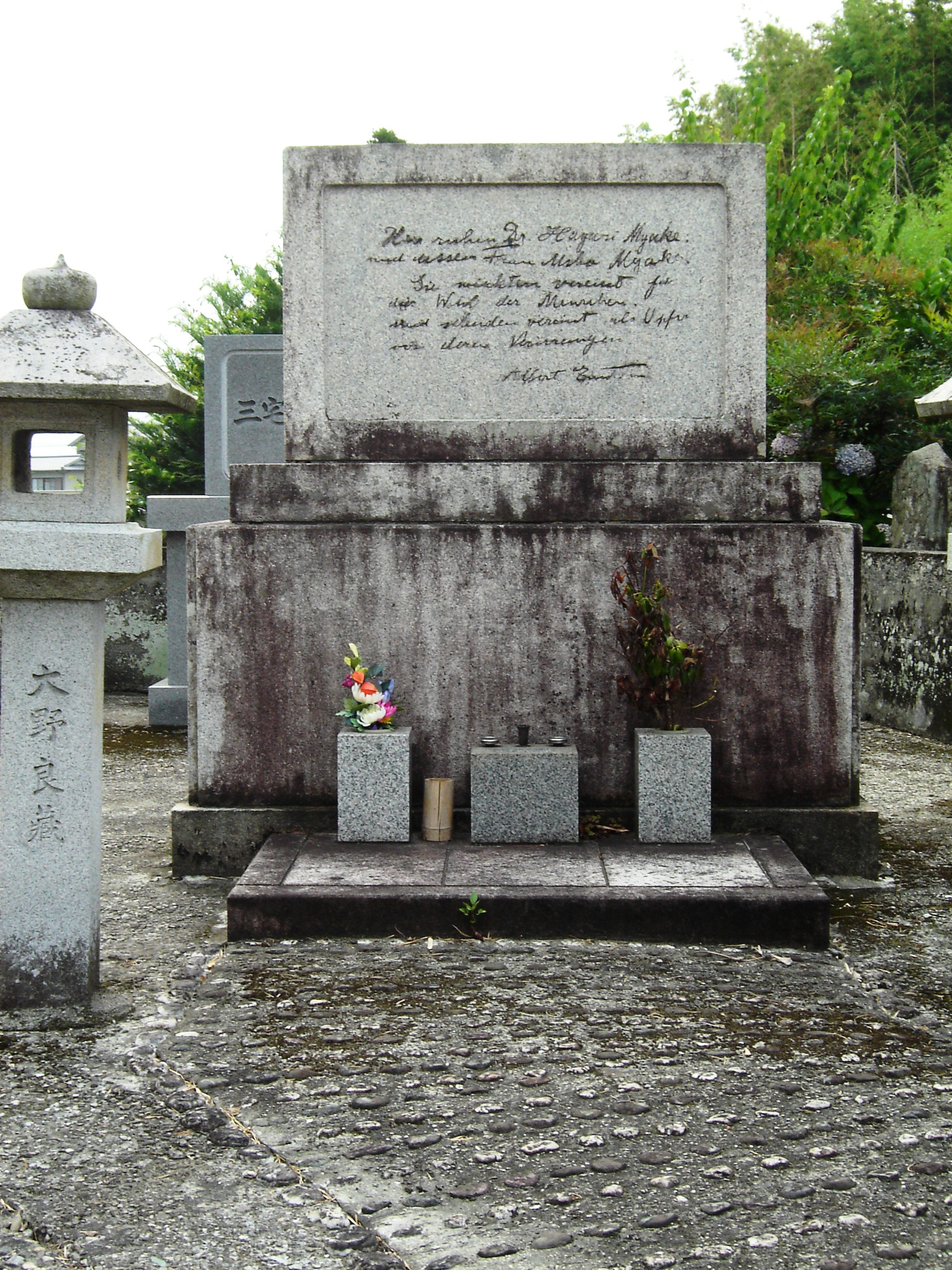 Einsteins Friendship Monument in Mima, Tokushima-ken, Japan